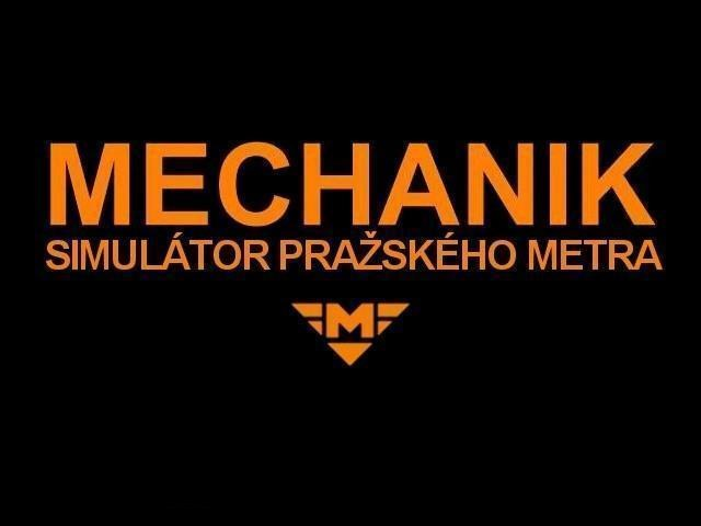 Logo české modifikace Mechaniku